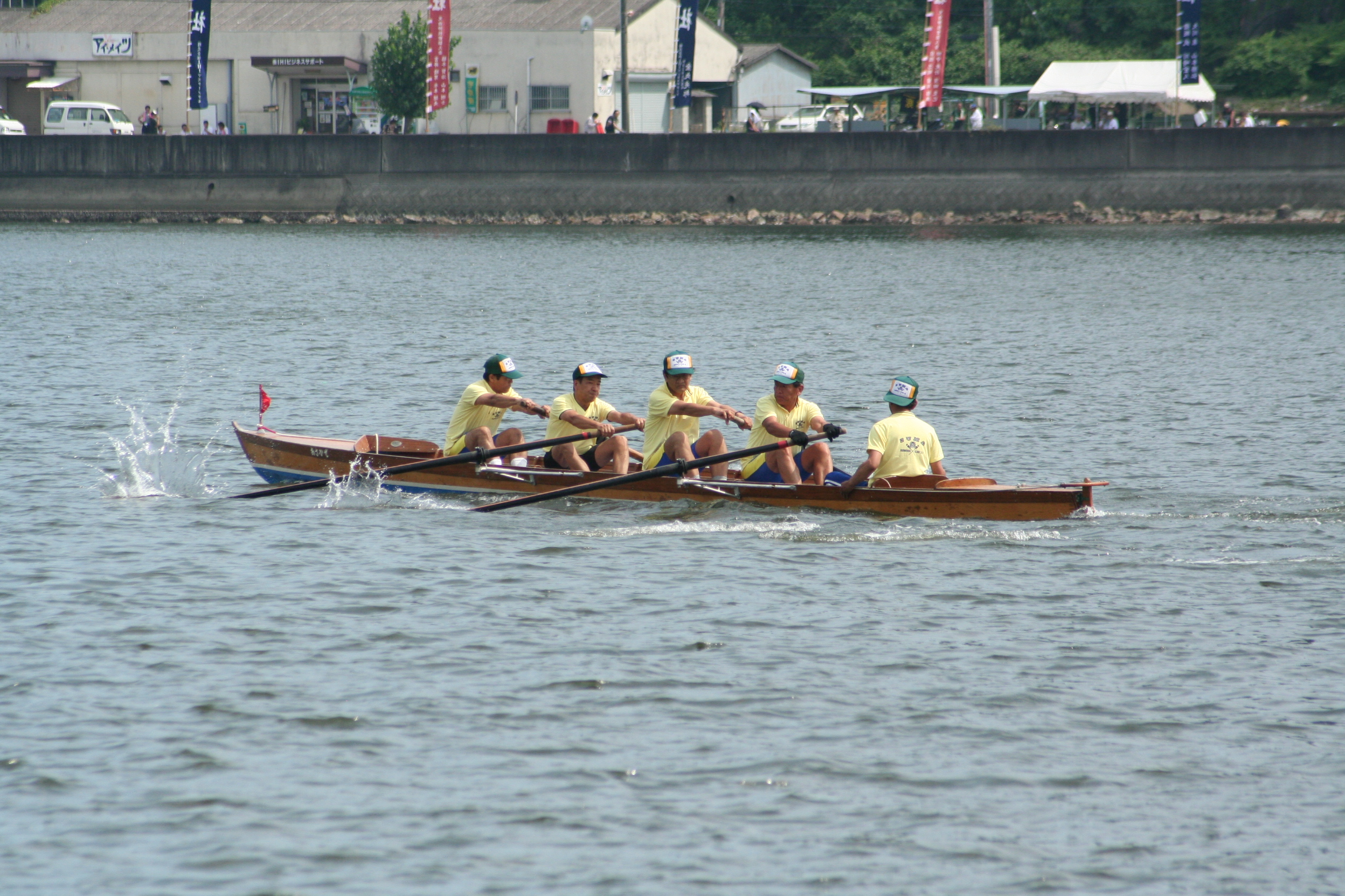 相生ペーロン祭。兵庫県相生市にて毎年開催される祭。2009年7月11･12日の2日間にかけて行なわれた祭の2日目の様子。